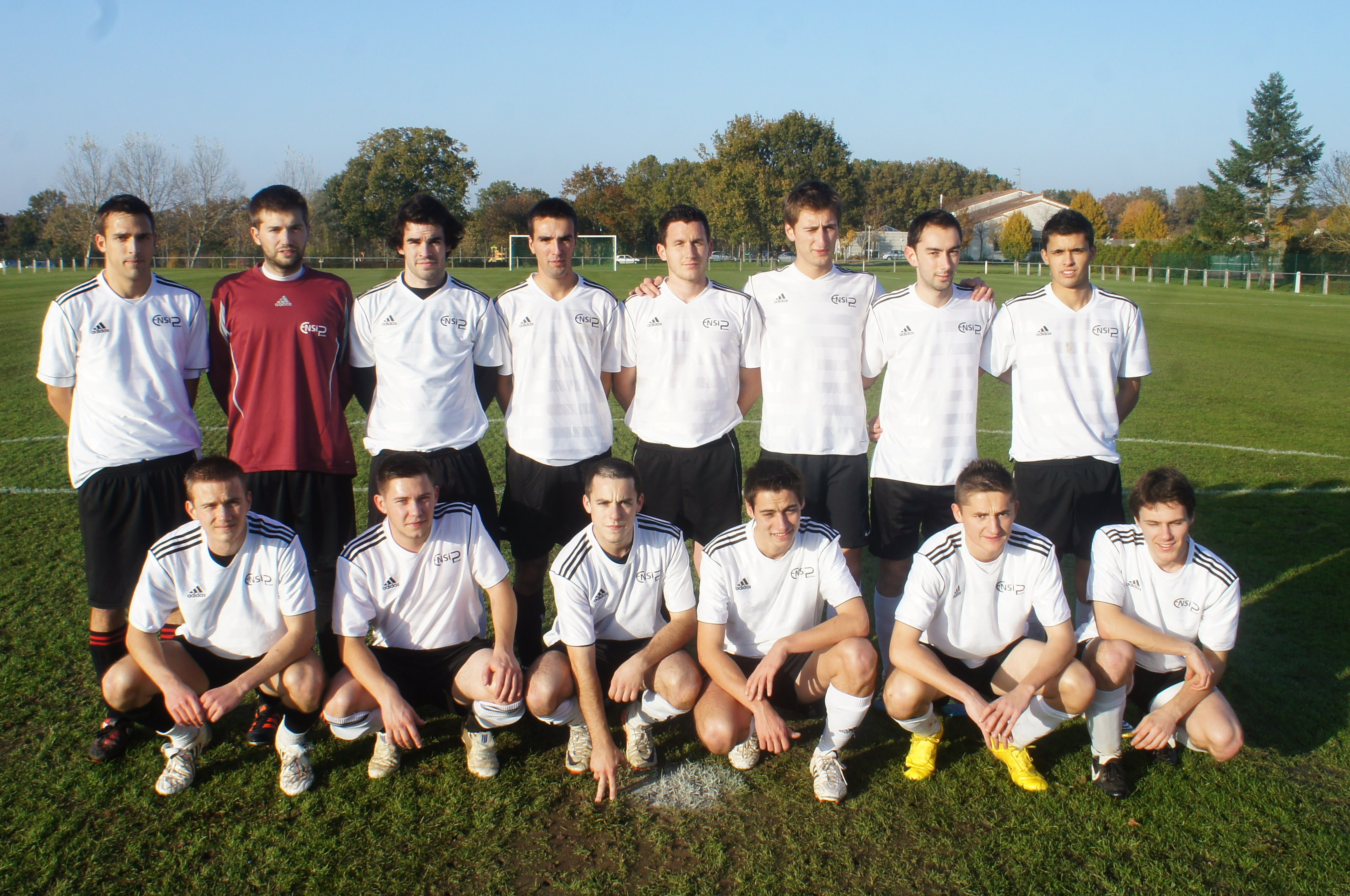 L'équipe 1 de football de l'ENSIP en 2012-2013. De haut en bas, de gauche à droite : Clément, Pierrick, Nicolas, Florian, Simon, Pierre-Baptiste, Julien, Elias, Sebastien, Simon, Arthur, Guillaume, Arnaud et Erwan. Personnes manquantes ( Nicolas, Clément, Paul et Florian)